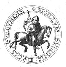 Hugo II. Burgundský